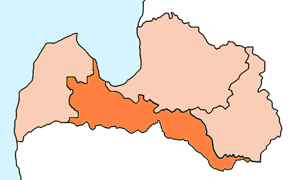 Mappa della diocesi cattolica di Jelgava, in Lettonia. Opera personale. Fonte per i confini delle diocesi